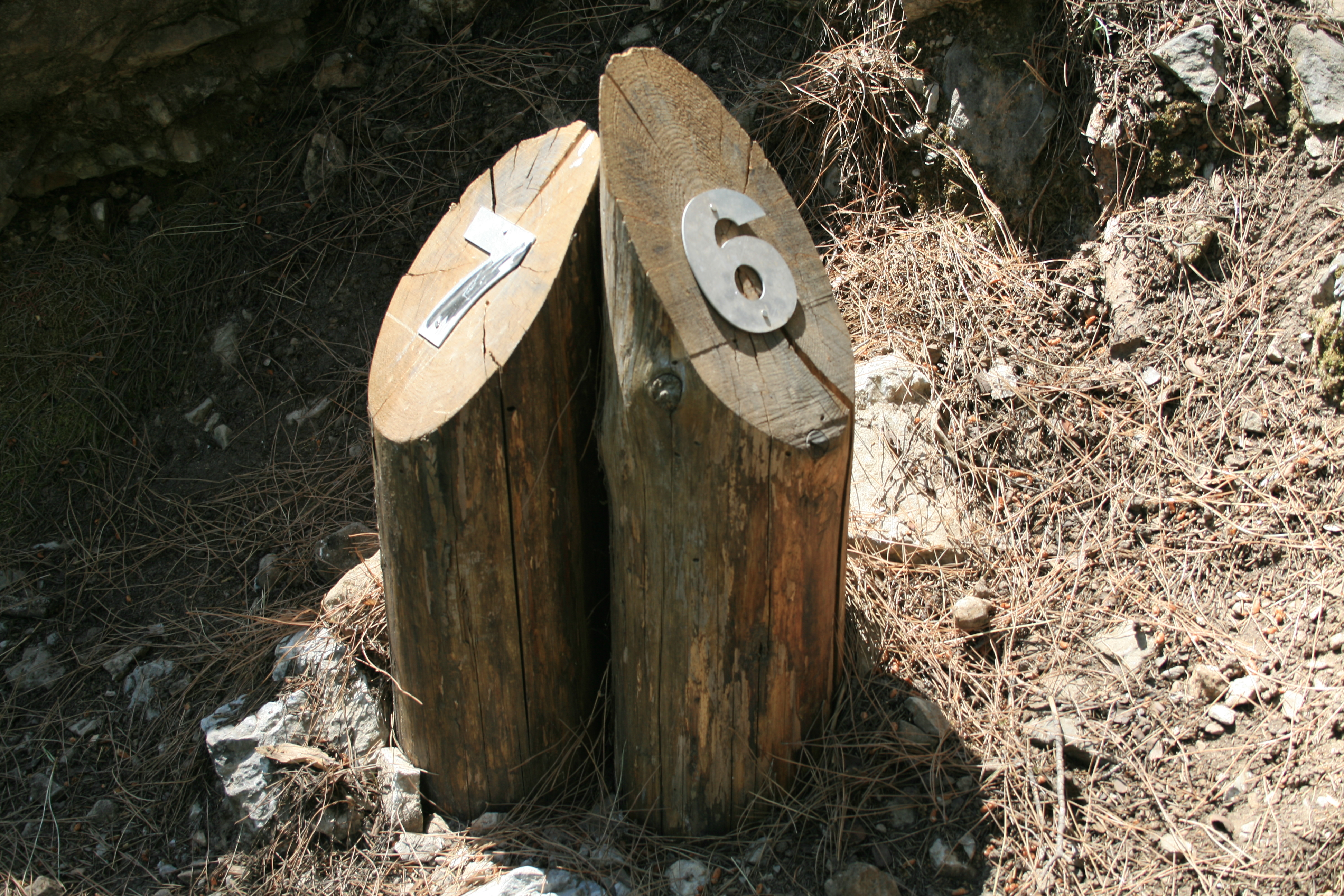 kilometer mark in Samaria Gorge